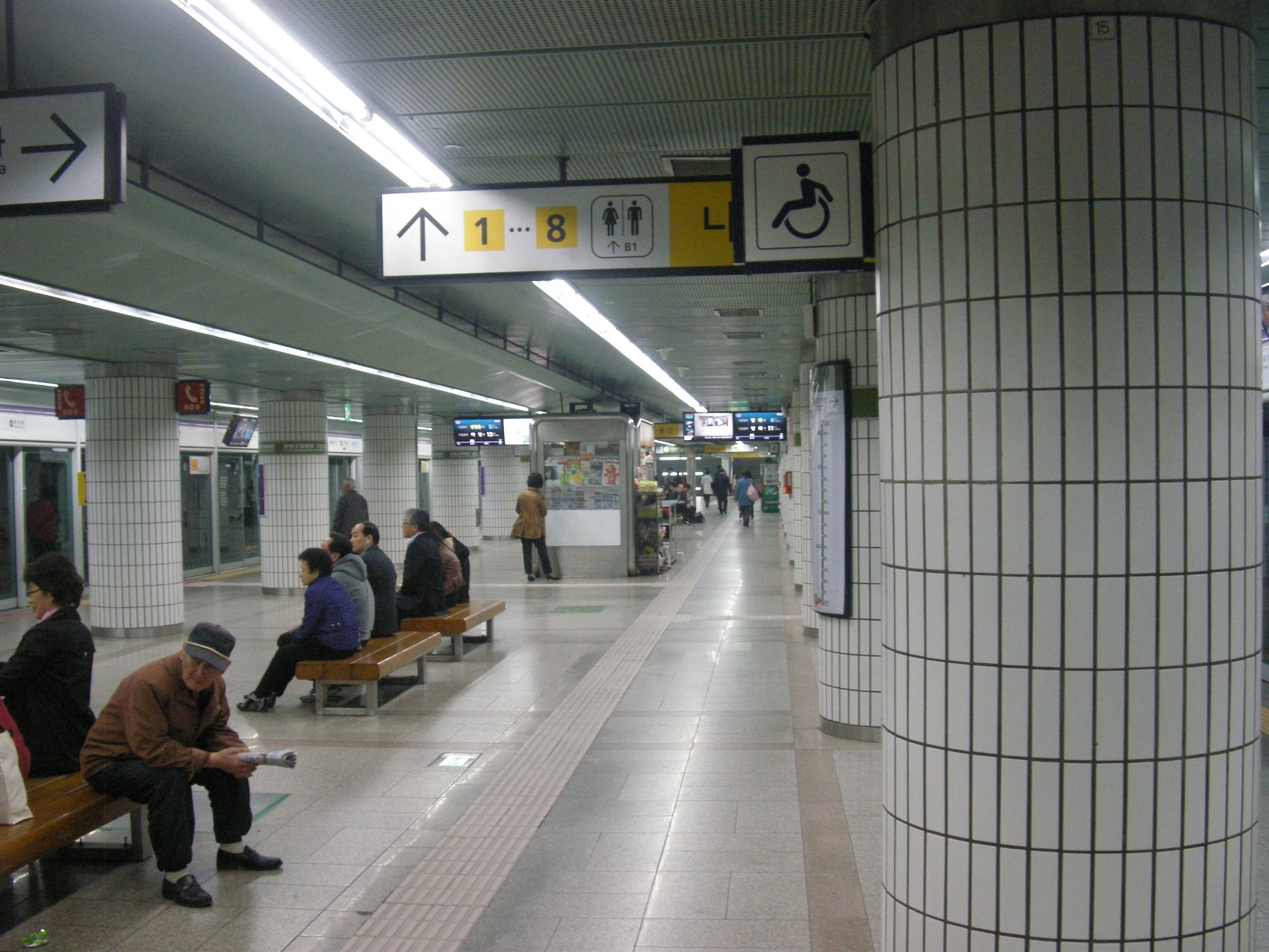 서울 지하철 5호선 군자역 승강장